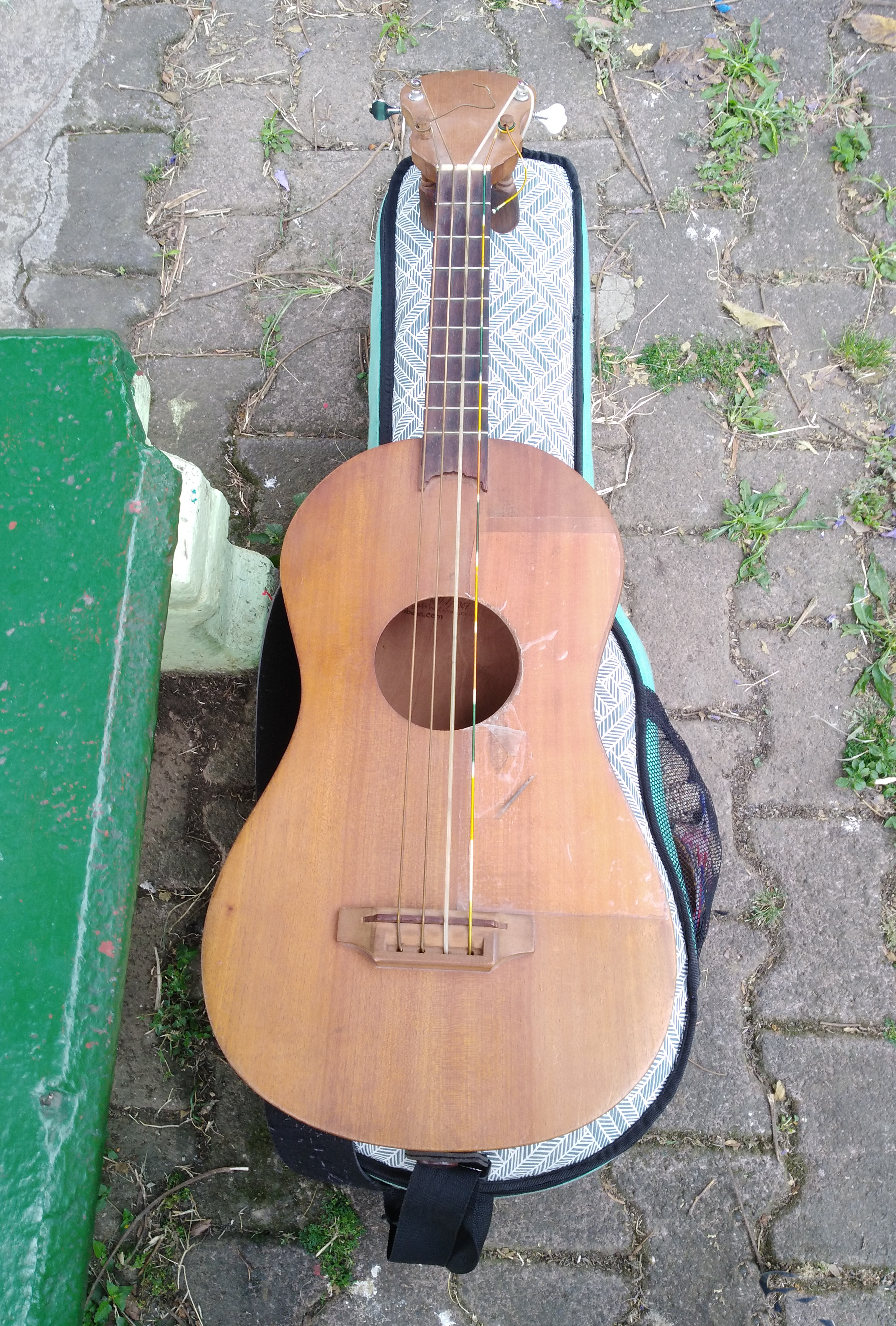 Fotografía de una leona en un fandango en la orduña, veracruz.